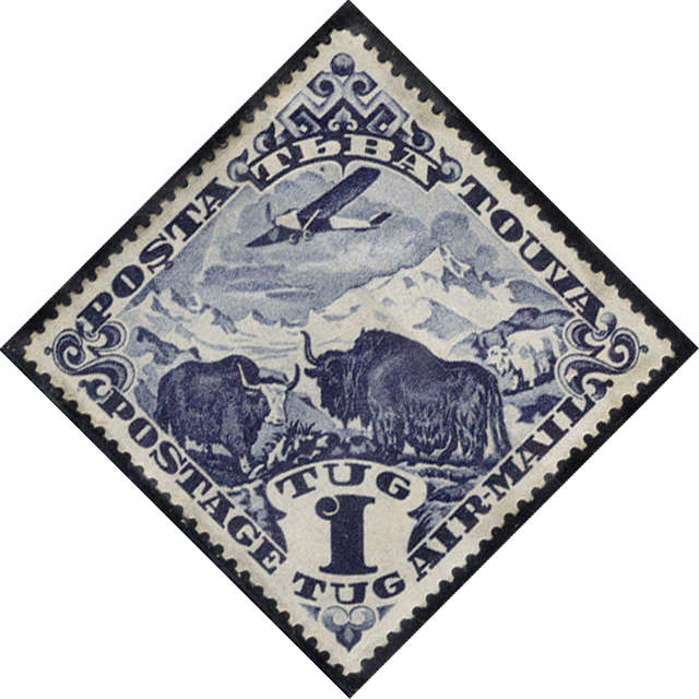 Авиапочтовая марка Тувинской Народной Республики, 1934. Самолёт над яками